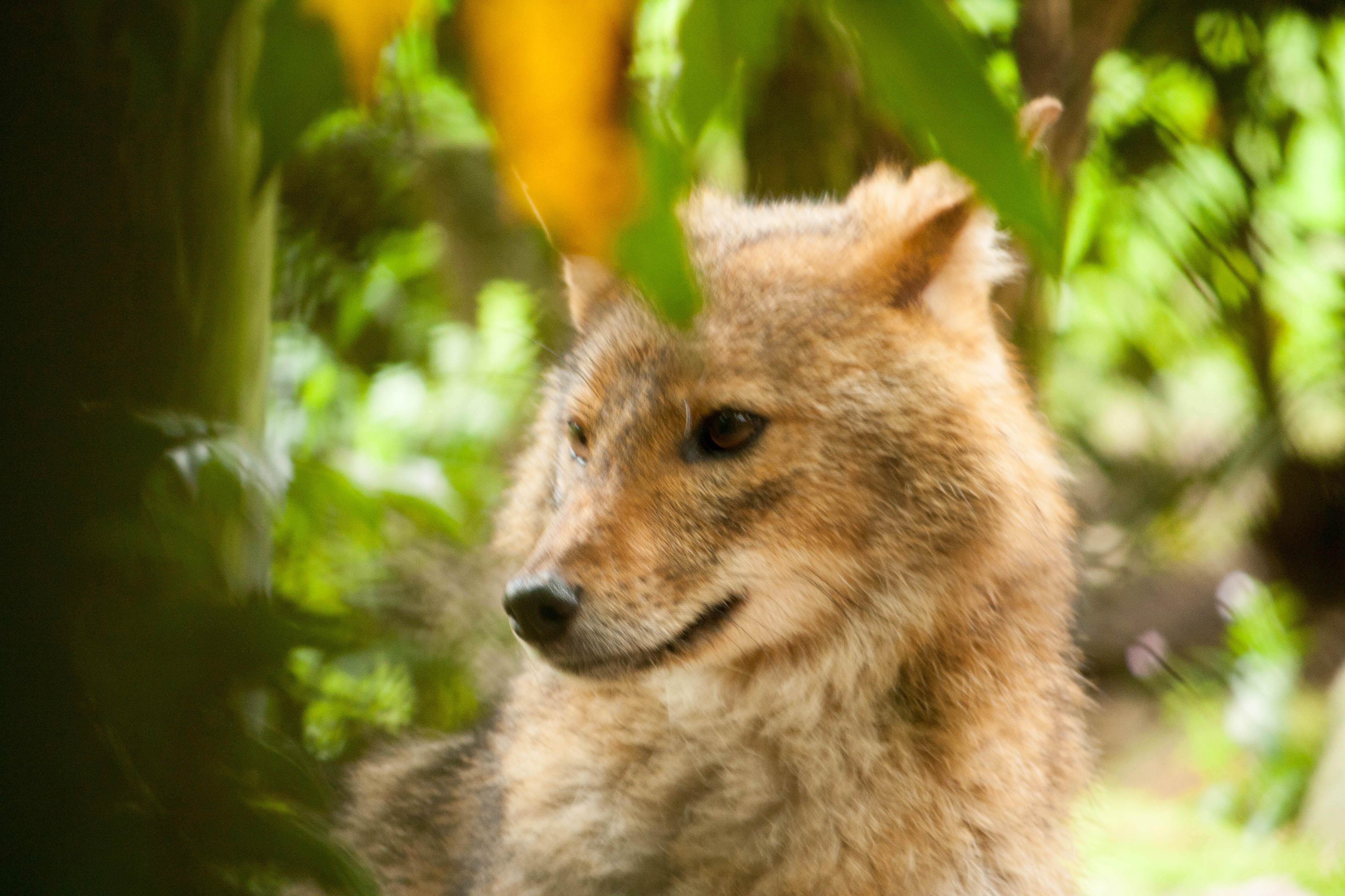 Golden jackal at Burgers Zoo